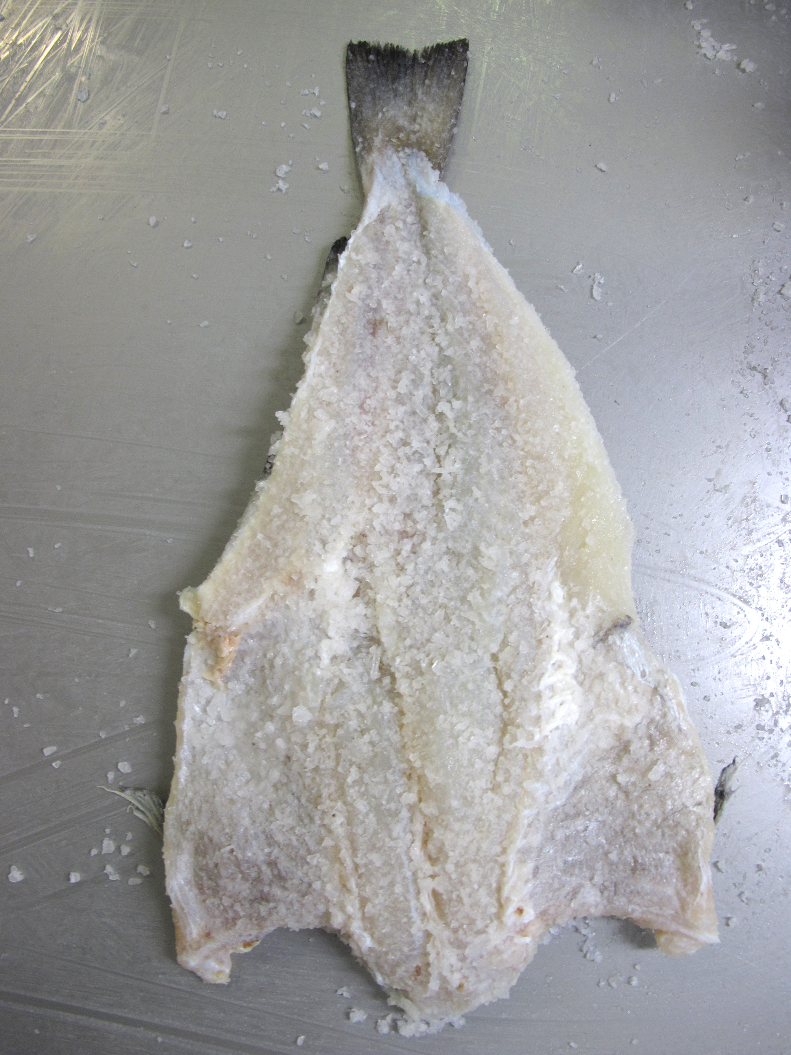 Baccalà delle Isole Faroe